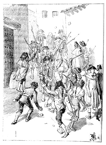 Ilustración de "El 19 de marzo y el 2 de mayo". Administración de La Guirnalda y Episodios Nacionales, 1882. Ilustraciones de los hermanos Mélida.